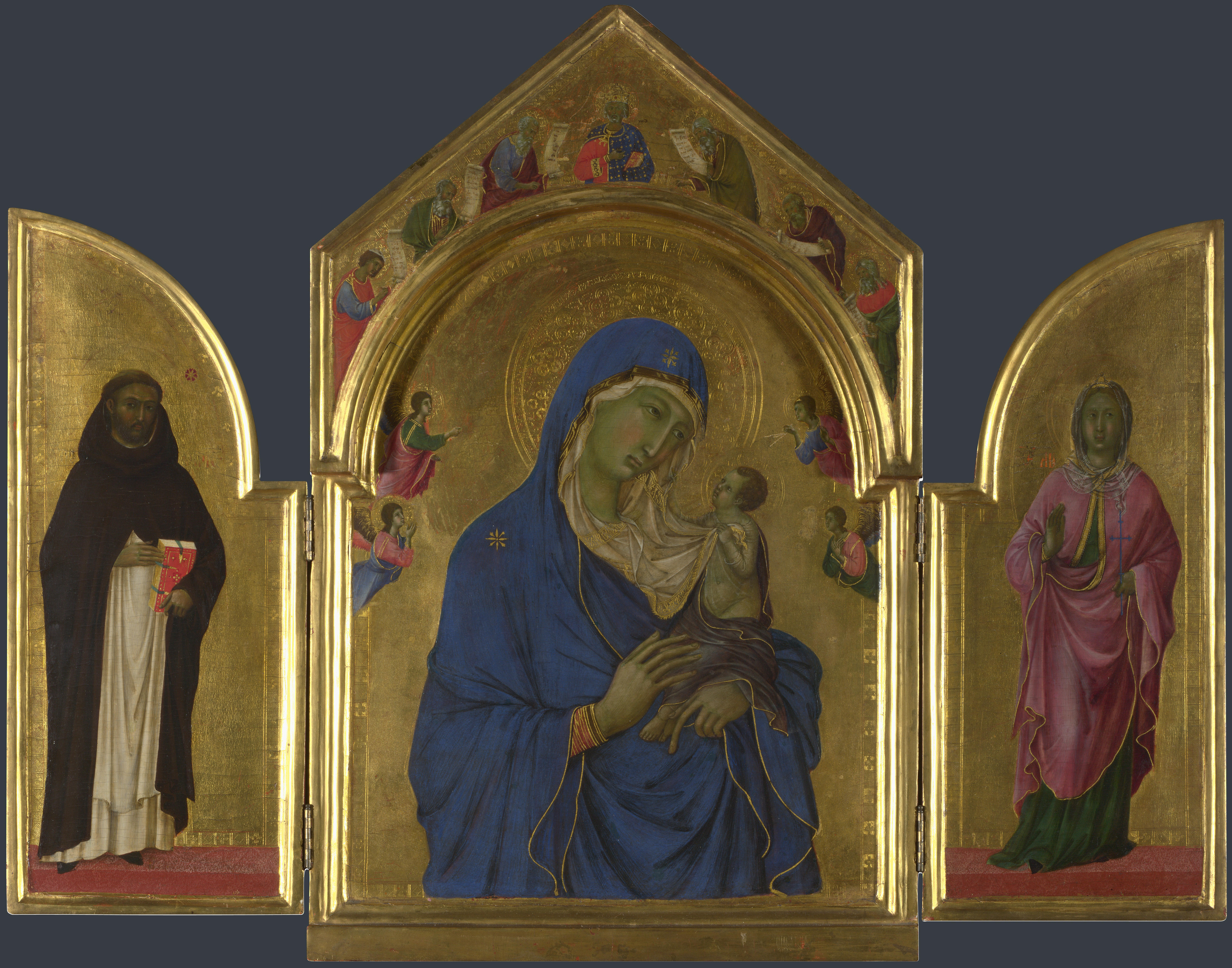 Duccio_London_triptych.jpg